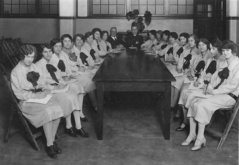 Institutrices de l'école Dollard-des-Ormeaux à Ville-Émard